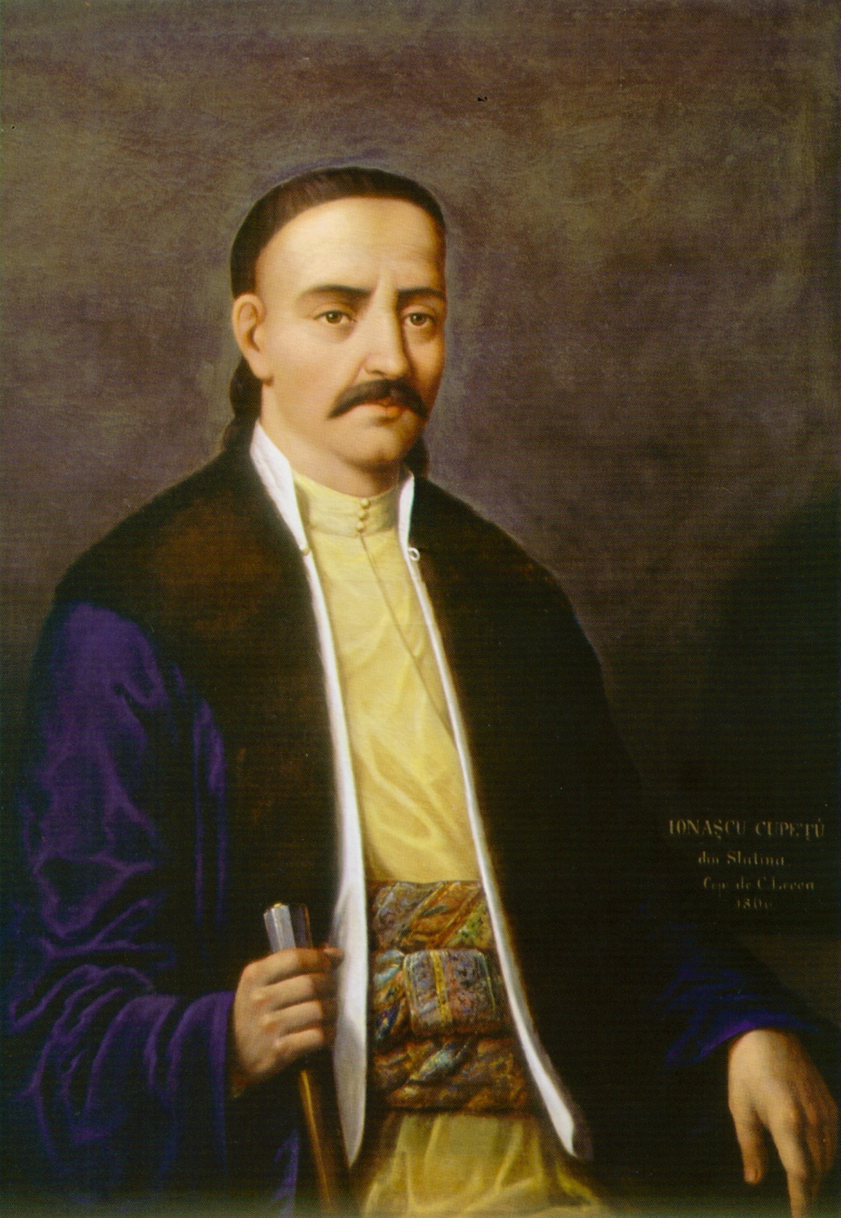 Portretul lui Ionașcu Cupețu, Muzeul Național de Artă al României